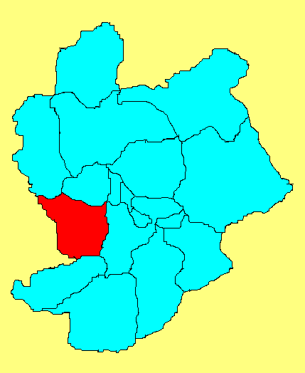 此图片由王云峰wangyunfeng原创，用于WIKI。